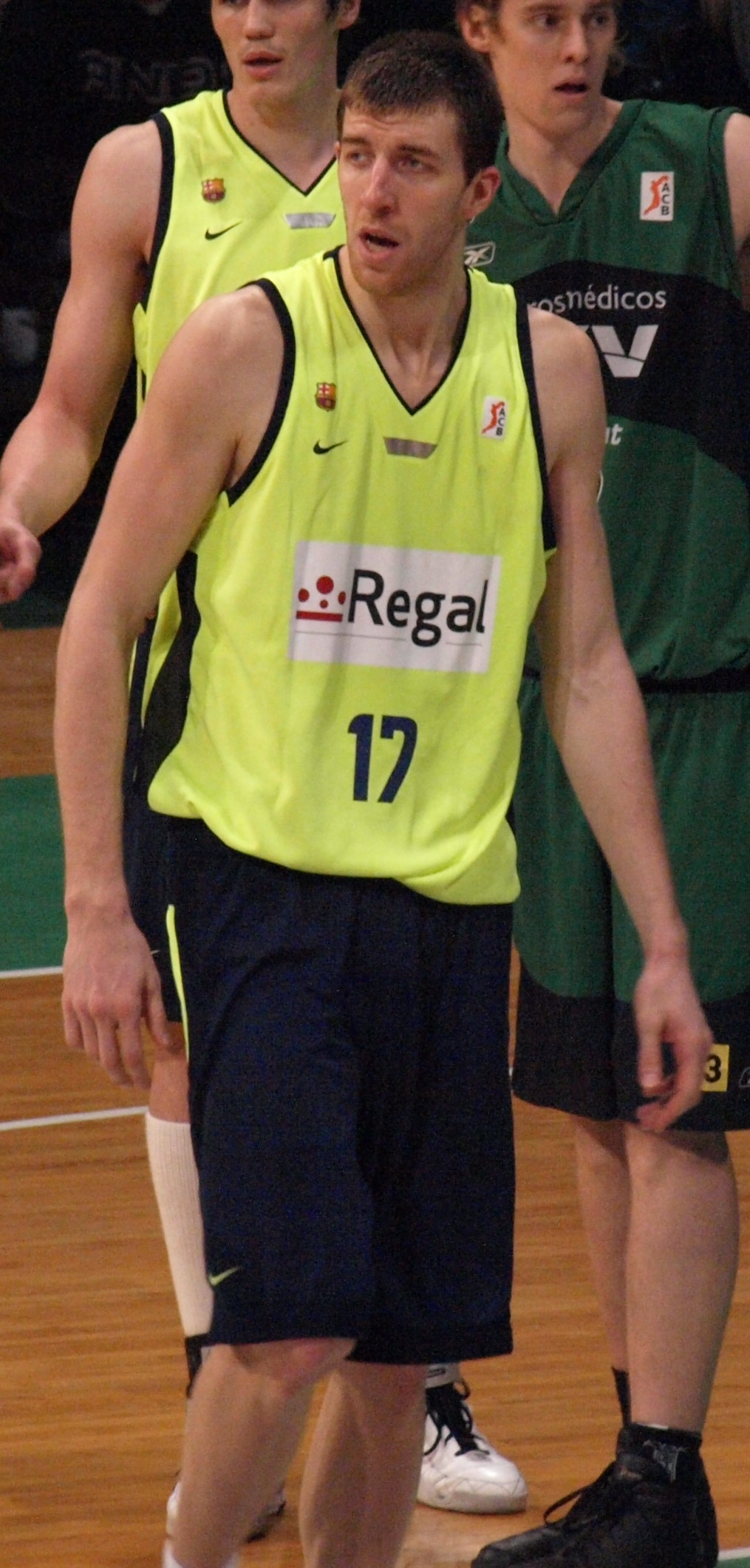 Fran Vázquez, en el partido que enfrentó al FC Barcelona y al DKV Joventut de liga ACB en el Olímpico de Badalona en enero de 2009